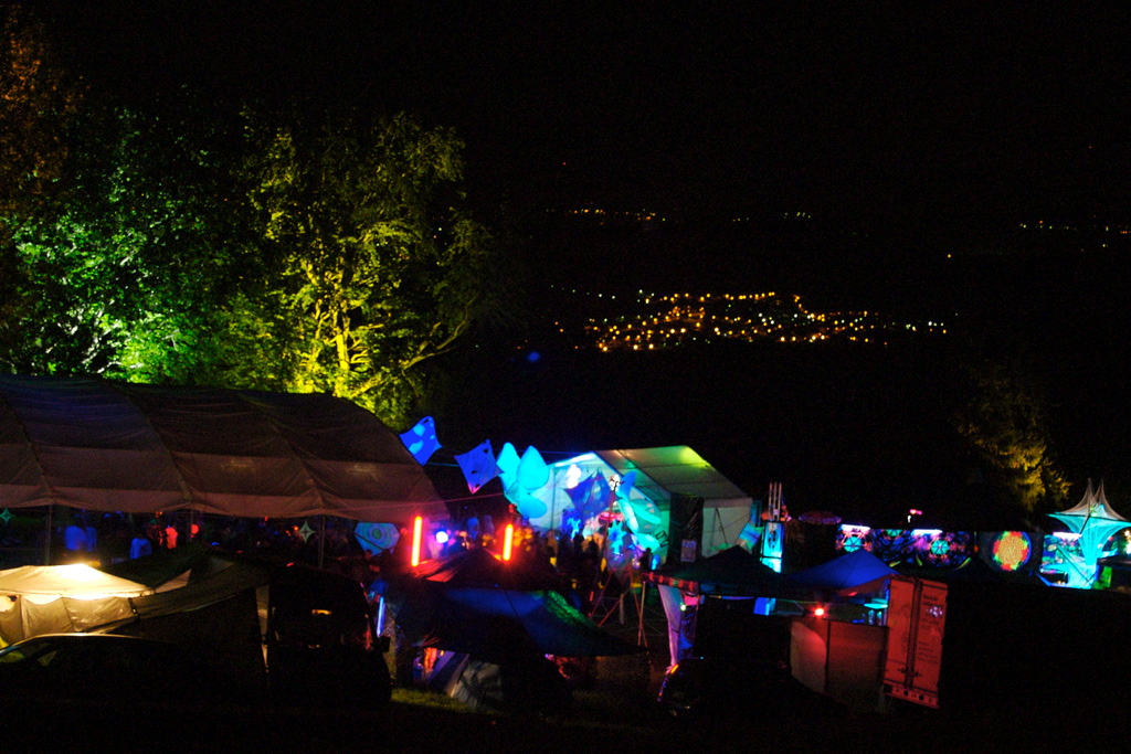 Goa-Outdoor-Party auf der ersten Jurakette mit Blick über das Schweizer Mittelland